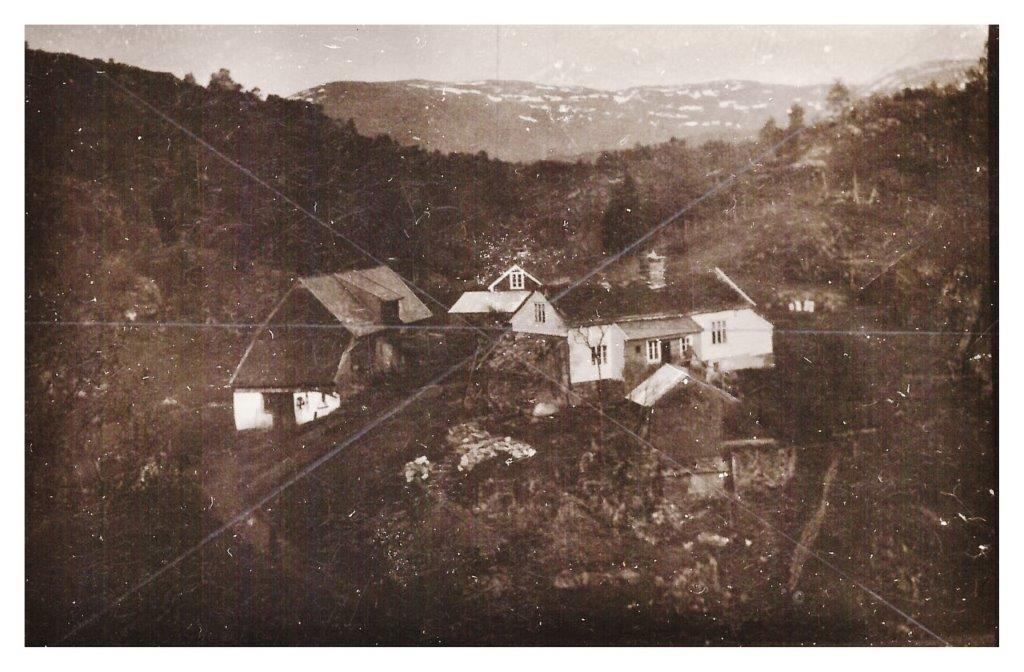 Bilete frå tunet i Koppen, Fotografert rundt 1914.